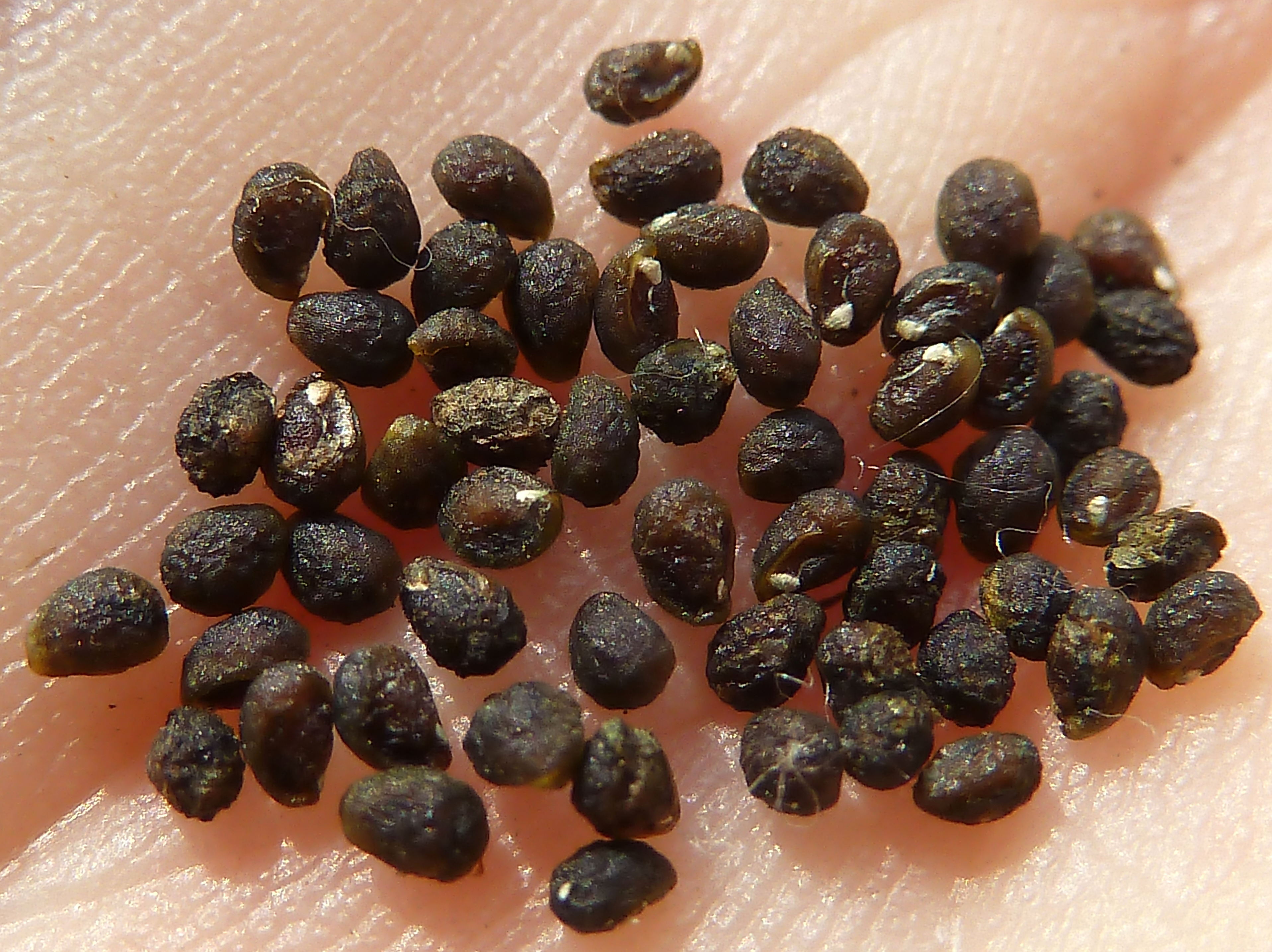 Heliotropium europaeum (Hierba verruguera, tornasol, verrucaria, ...) - Mericarpos sueltos. - Descampado, calle del Compositor Manuel Berná García, Albatera (Provincia de Alicante, España).